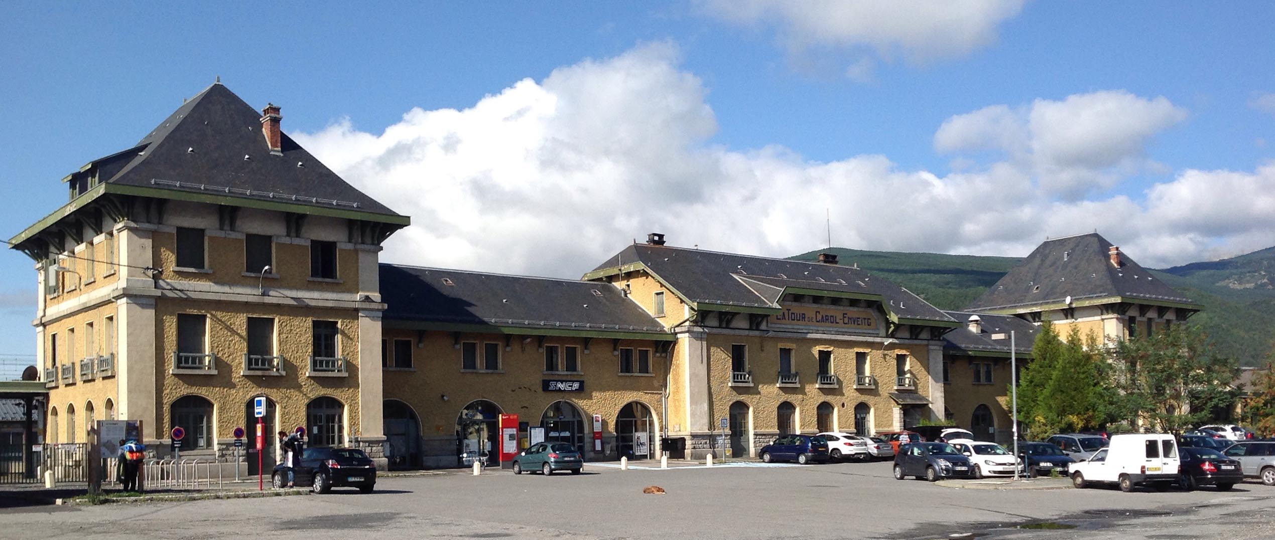 Estació Tor de Querol Enveig 2015